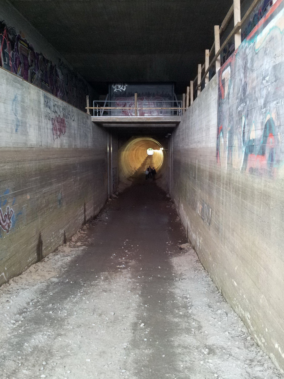 Description